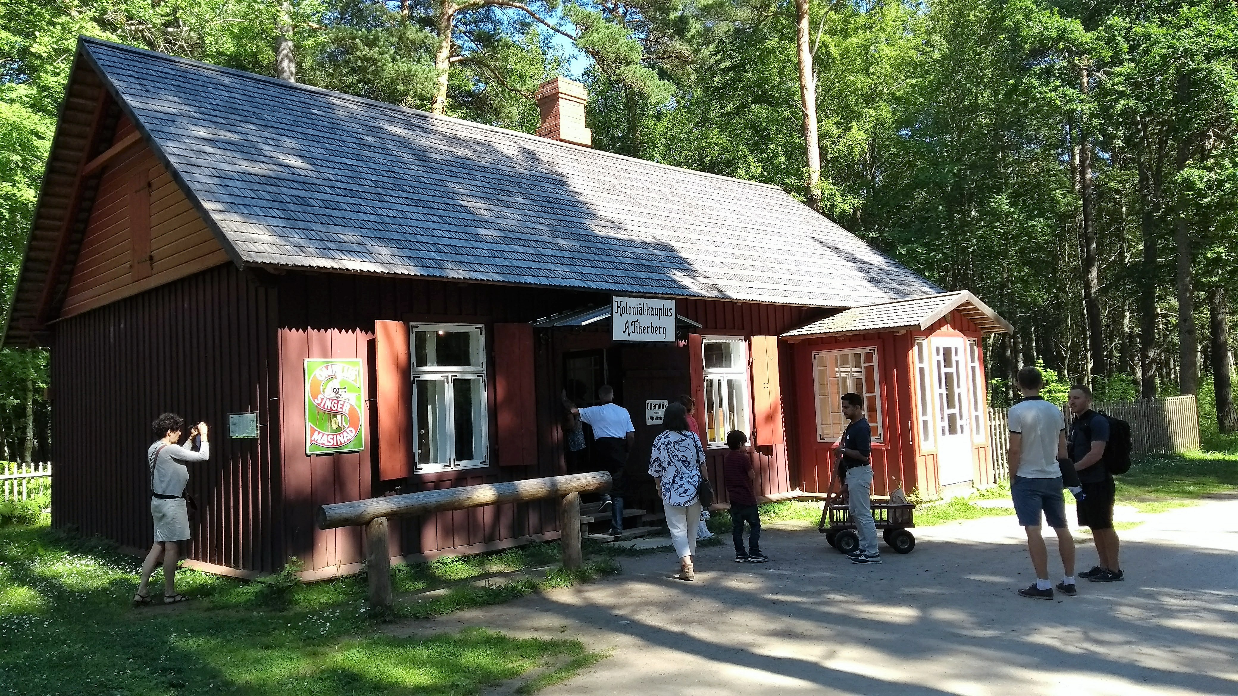 Lau külapood Eesti Vabaõhumuuseumis.